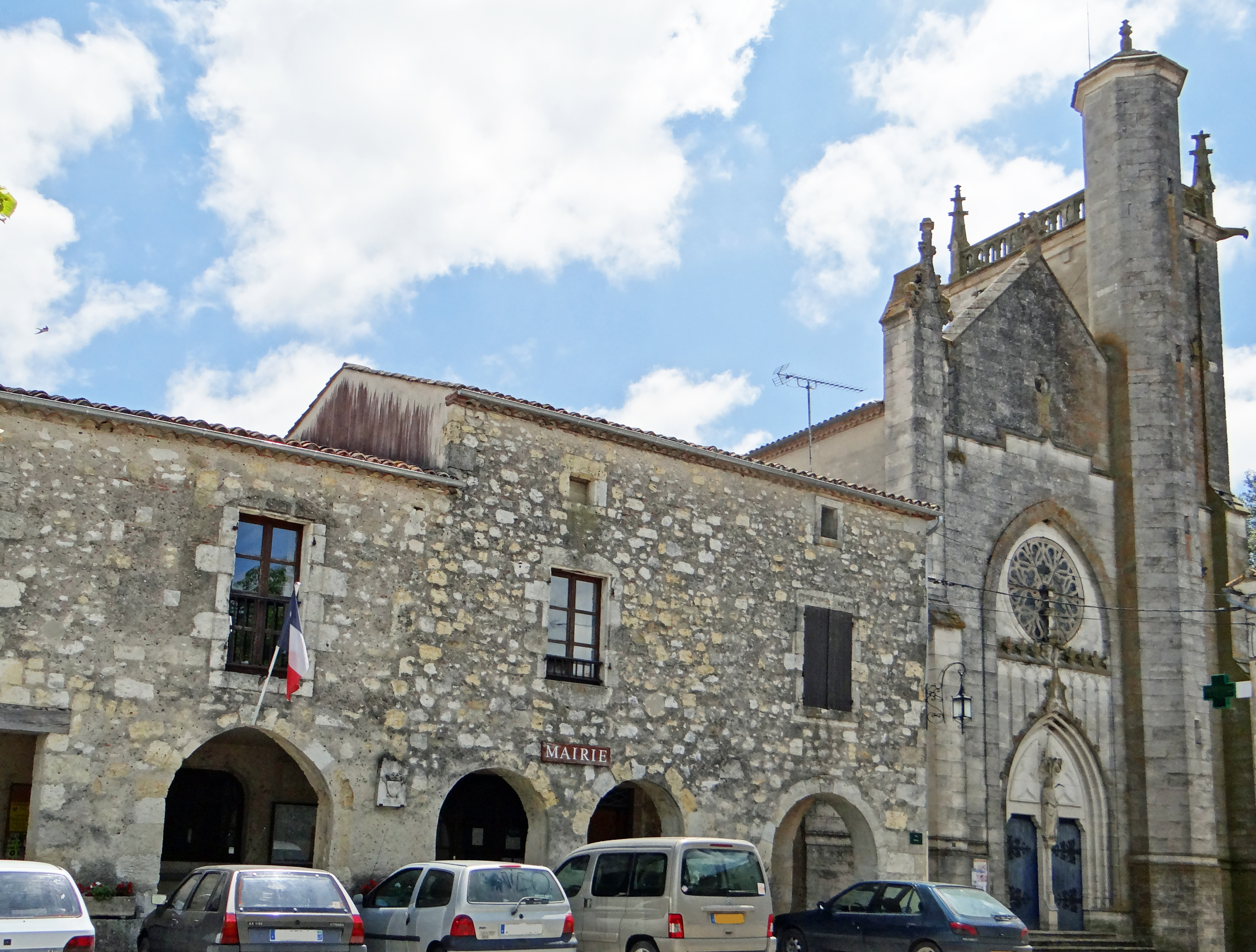 Lamontjoie - La mairie et l'église